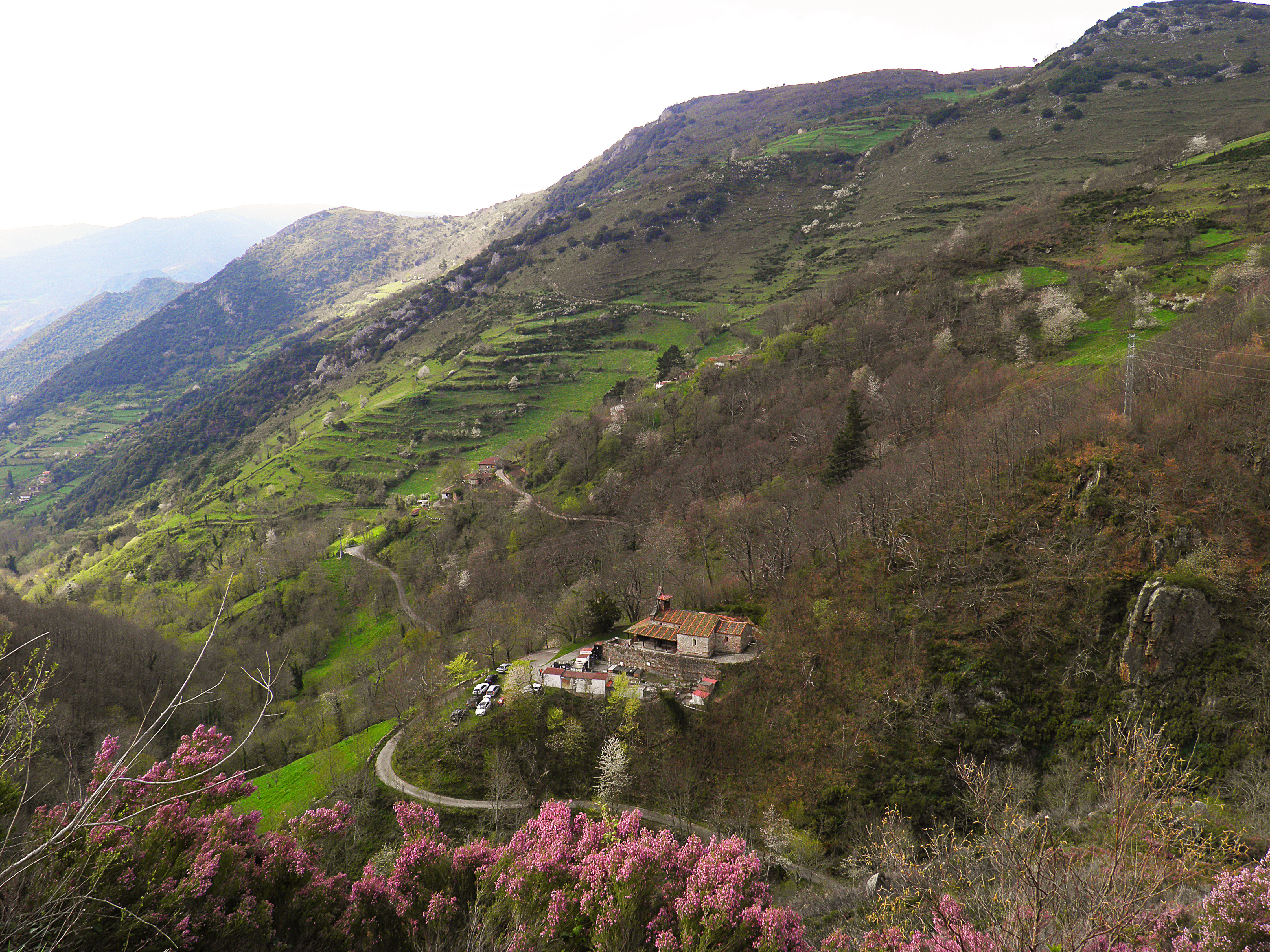 Clavillas (Somiedo, Asturias)